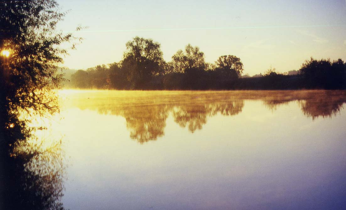 Sonnenaufgang am Main bei Mainberg nahe Schweinfurt